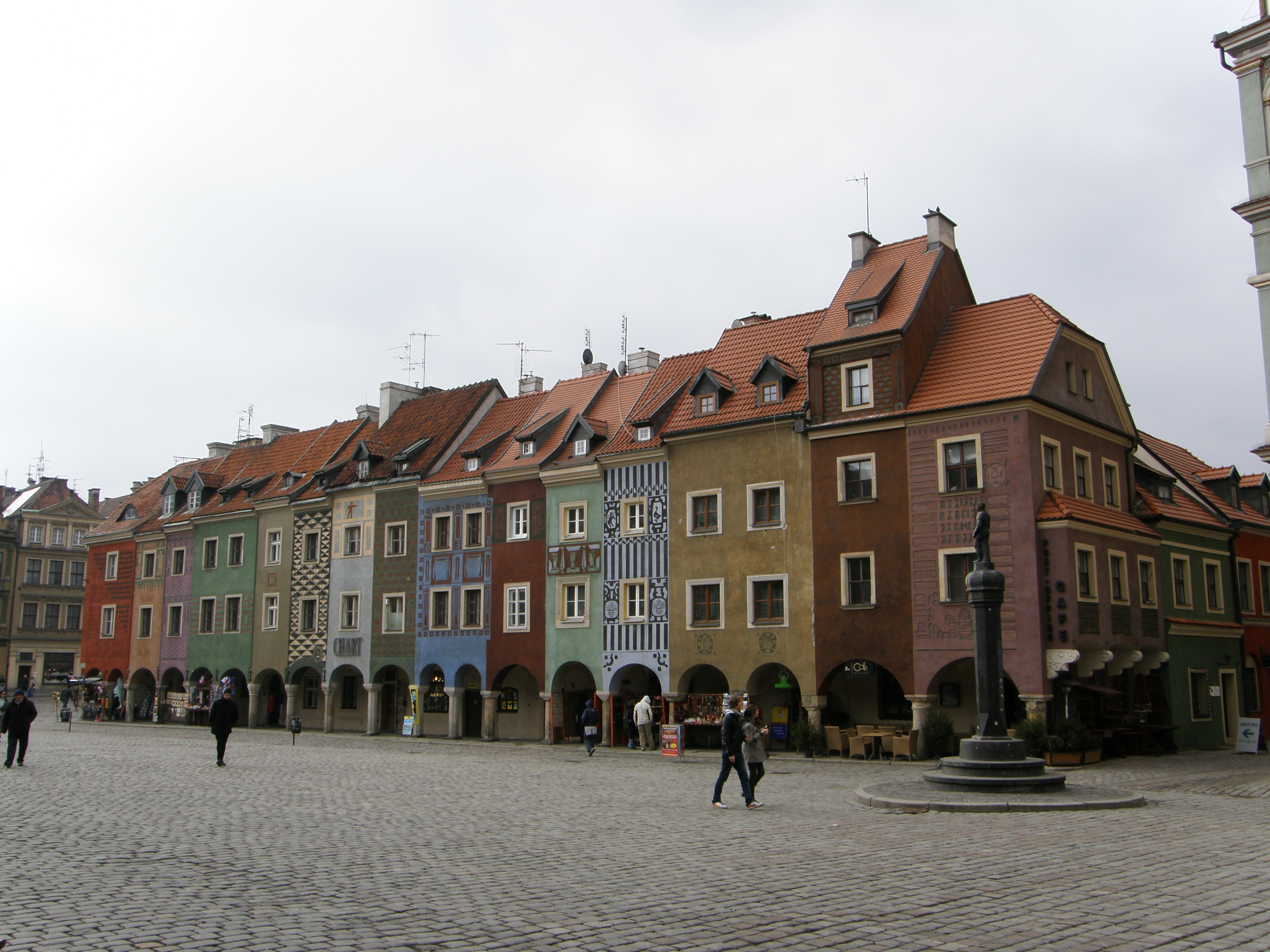 Poznań - domki budnicze w zespole urbanistyczno-architektonicznym Starego Rynku (zabytek nr A 195)